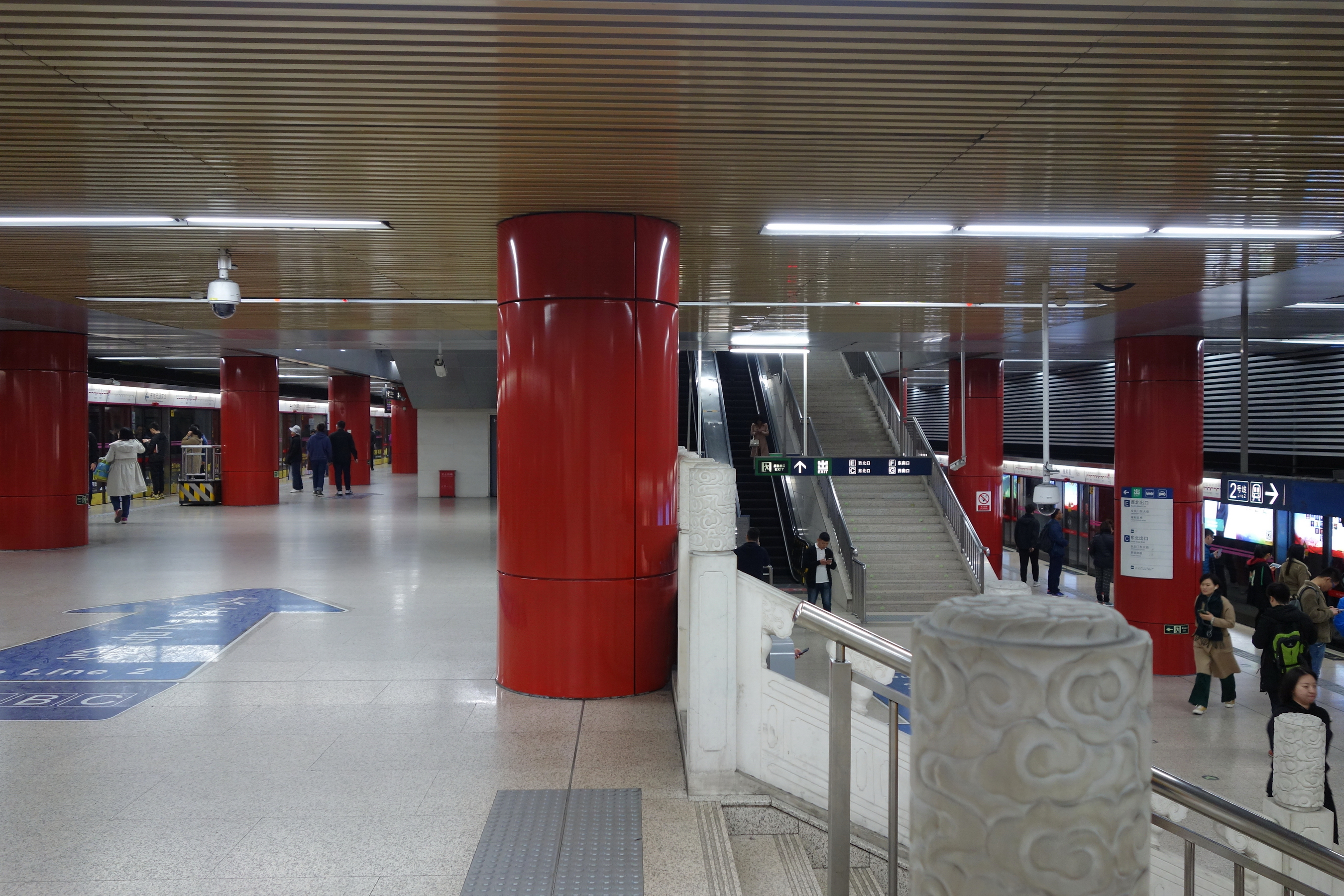 北京地铁5号线雍和宫站特殊的错层站台